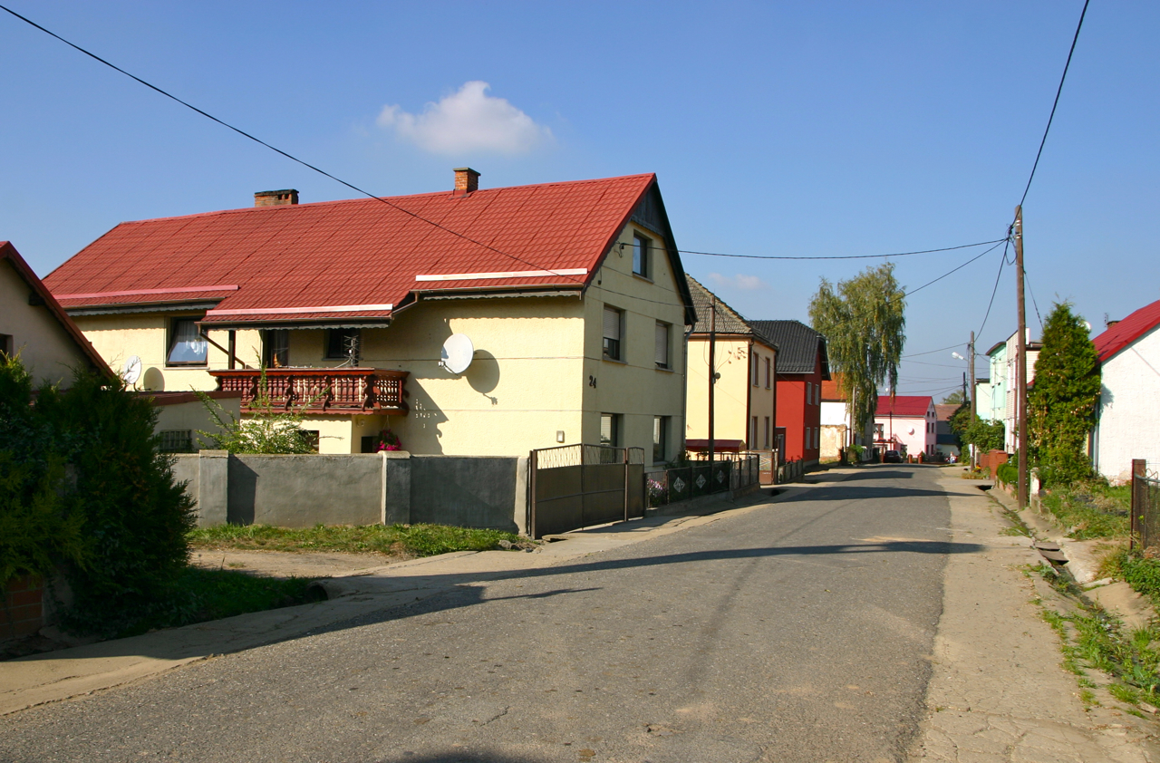 Grodzisko - wieś w Polsce położona w województwie opolskim, w powiecie kędzierzyńsko-kozielskim, w gminie Pawłowiczki.